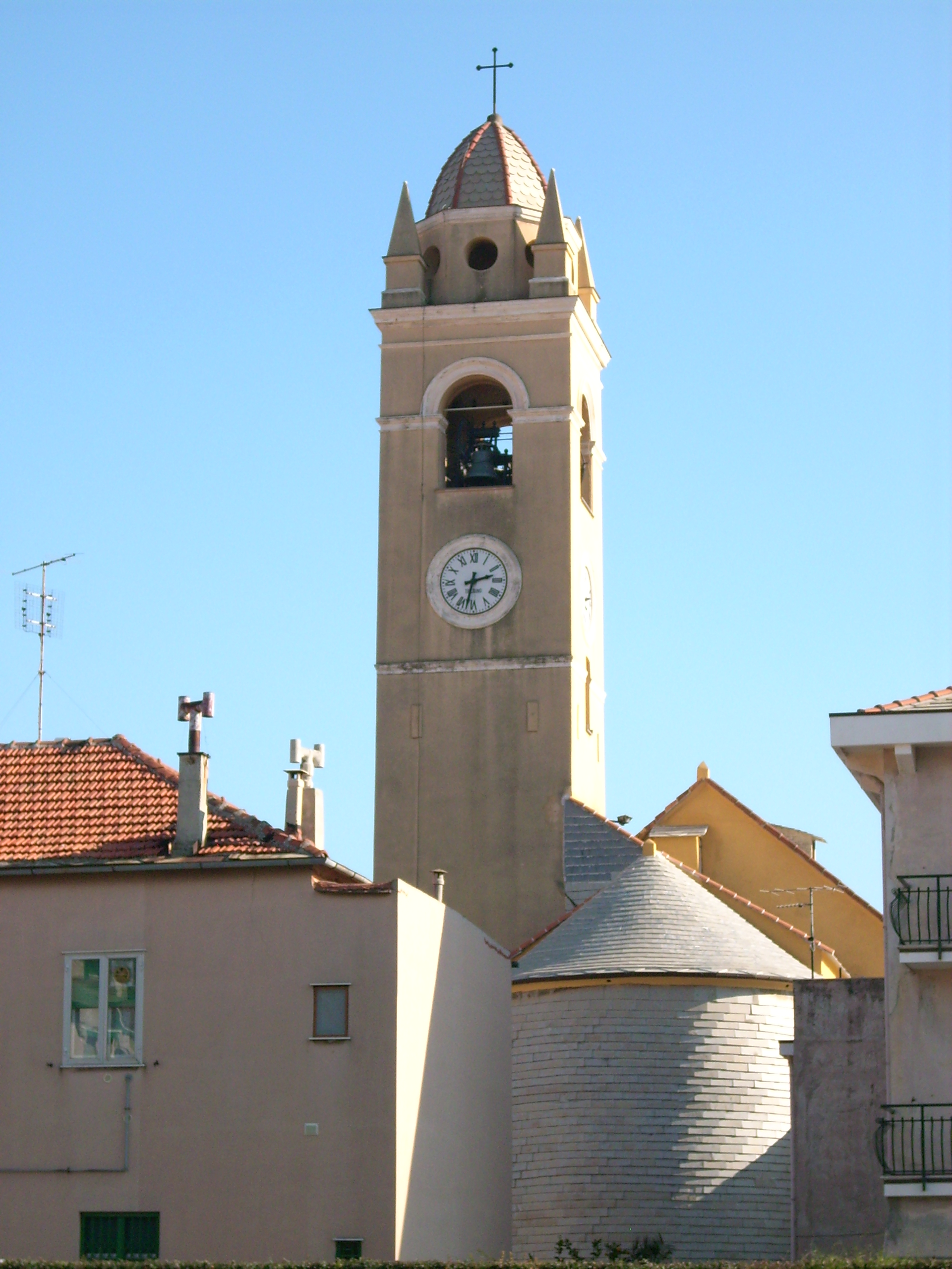 Campanile della chiesa della Santissima Annunziata presso Spotorno, Liguria, Italy